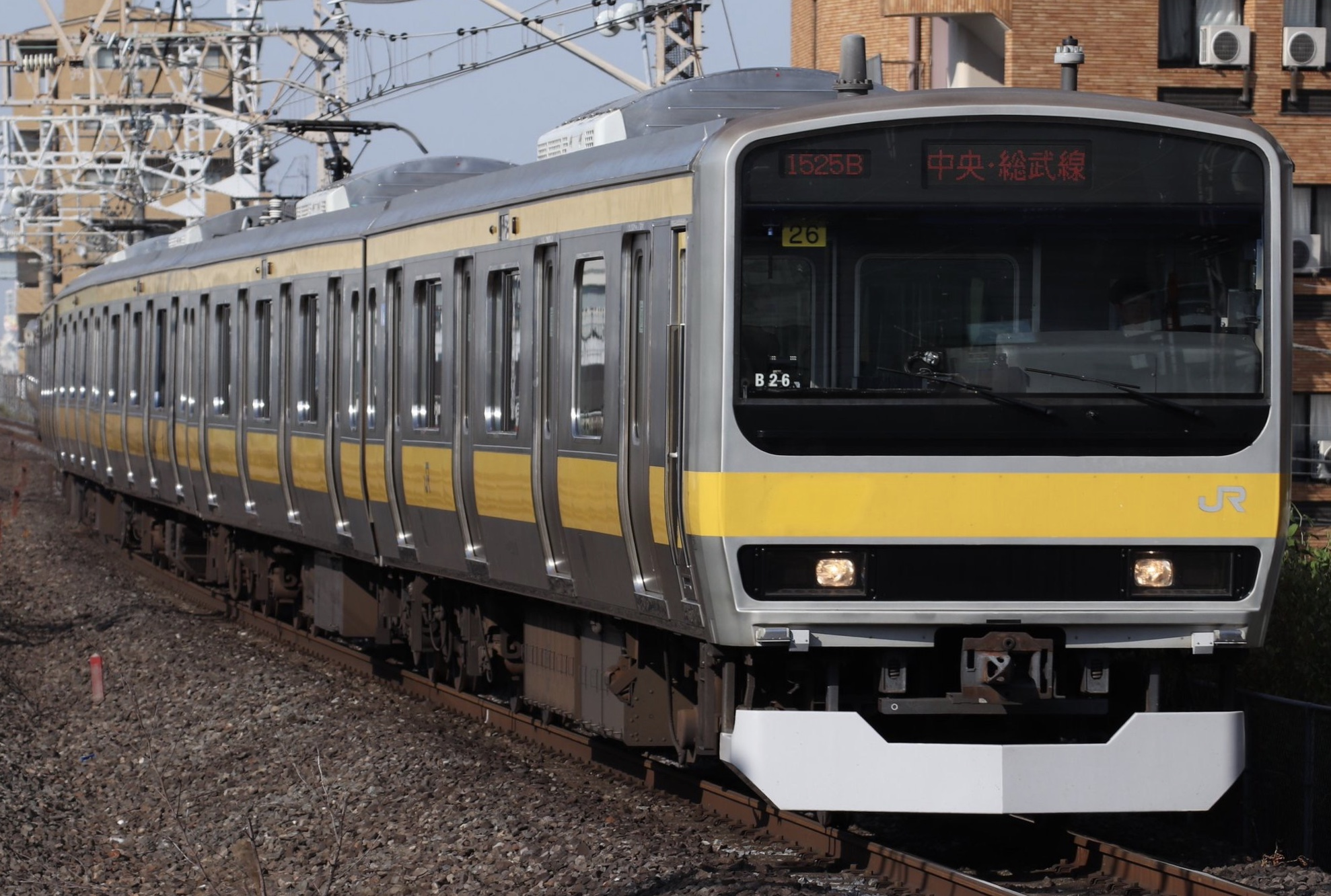 JR東日本E231系0番台ミツB26編成 平井駅